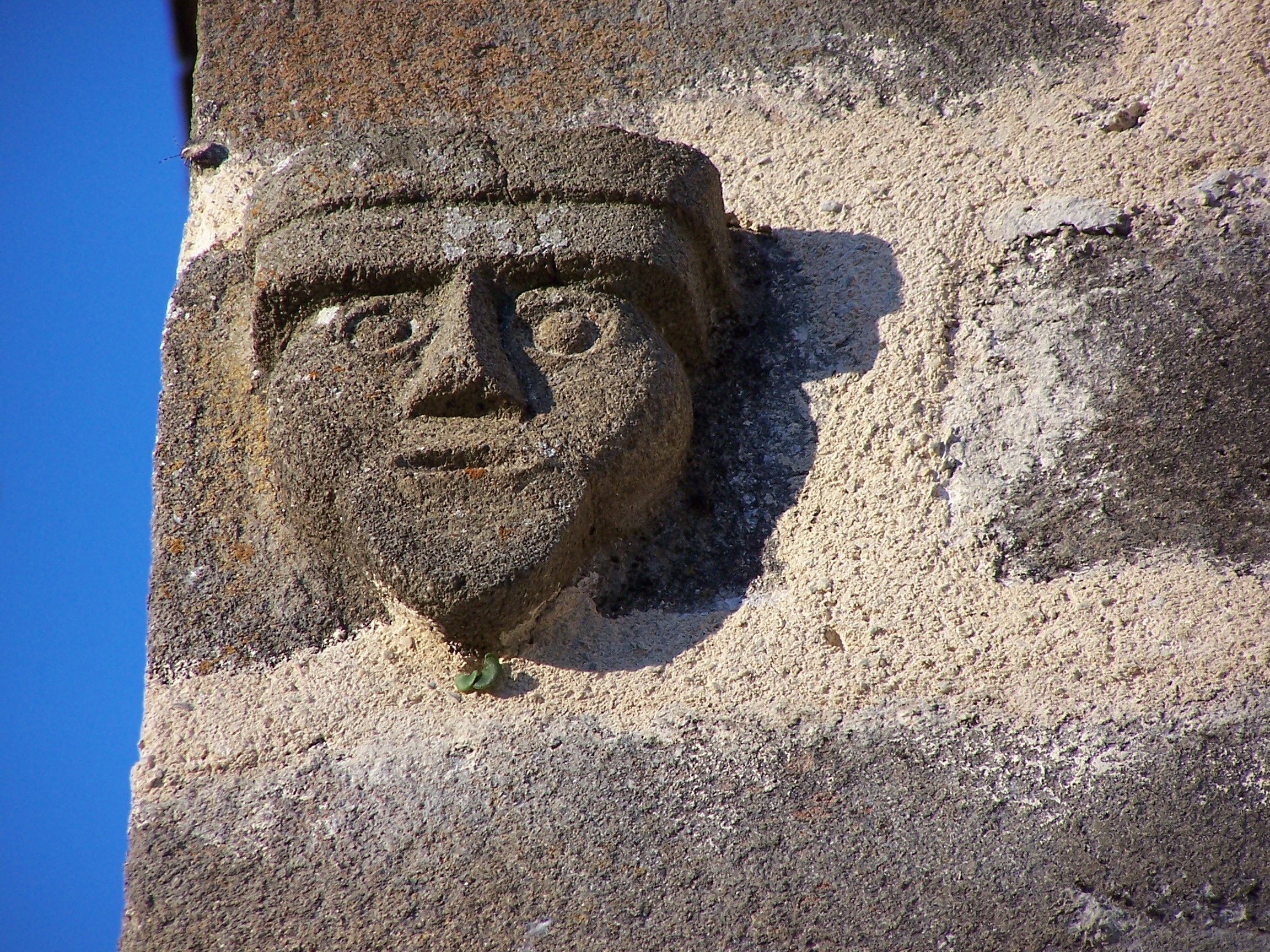 Eglise d'Escots (Haute-Pyrénées) ; détail sur le clocher René Vidal